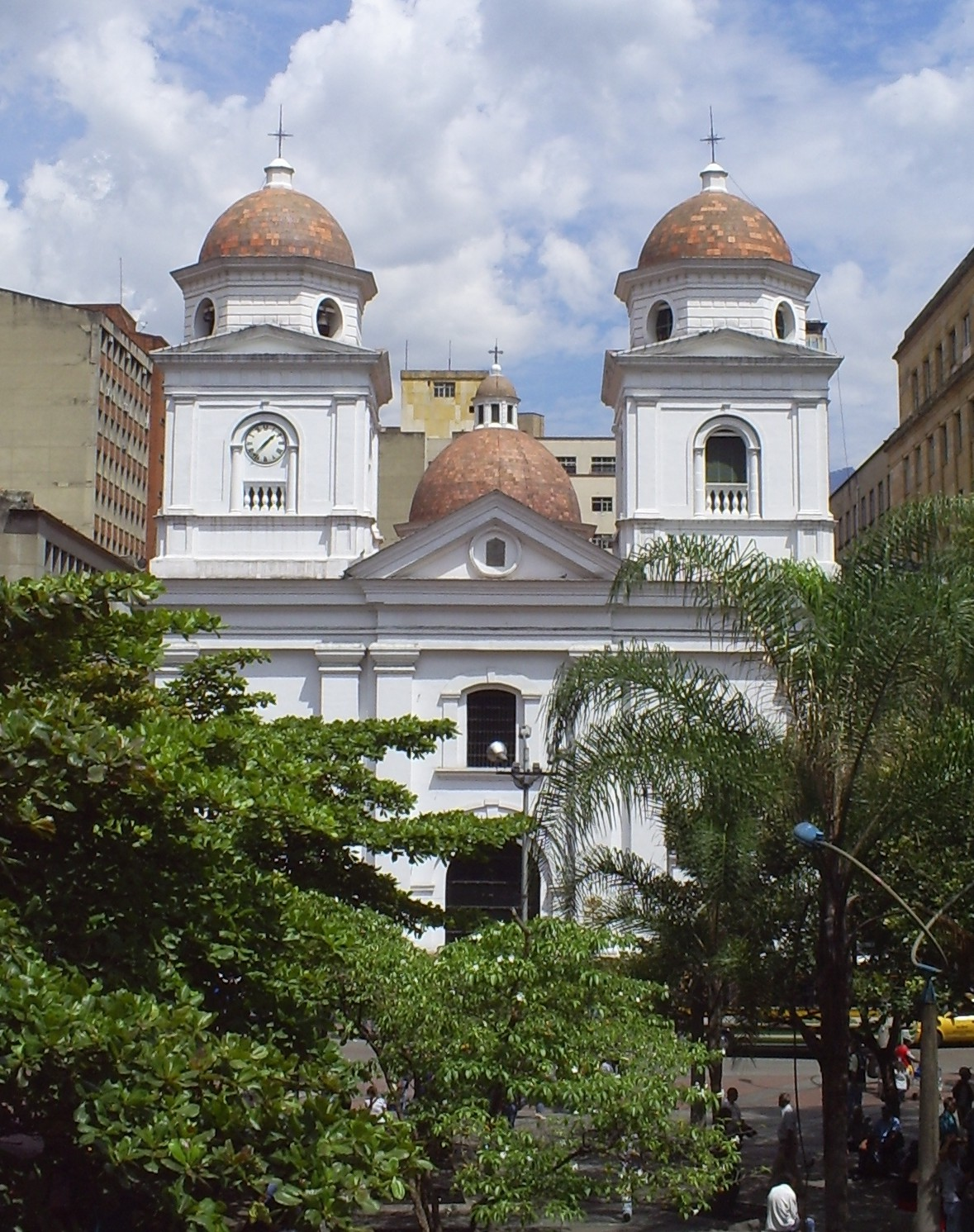 Iglesia de Nuestra Señora de la Candelaria, Medellín, Colombia.